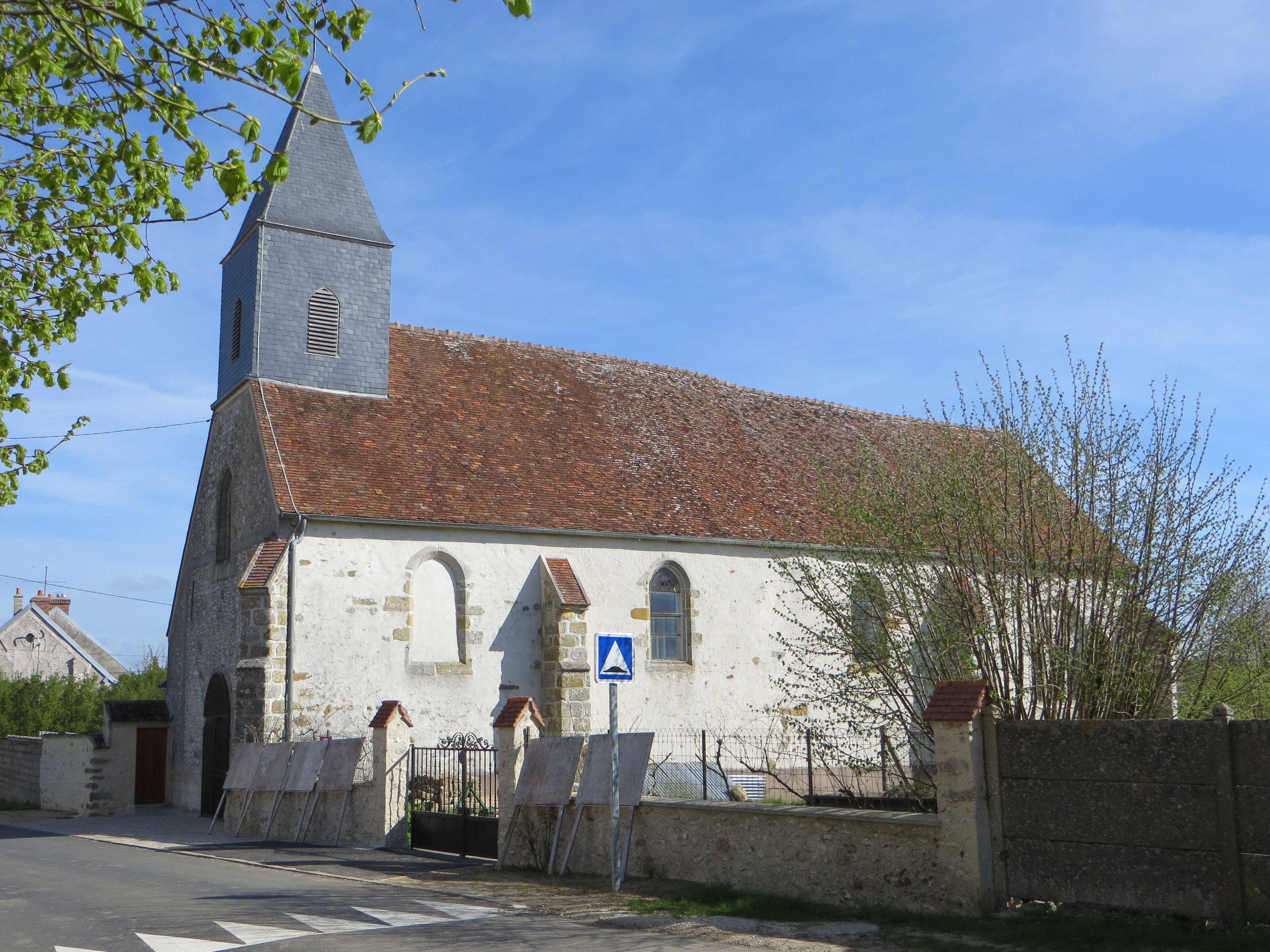 Vue générale de l'église